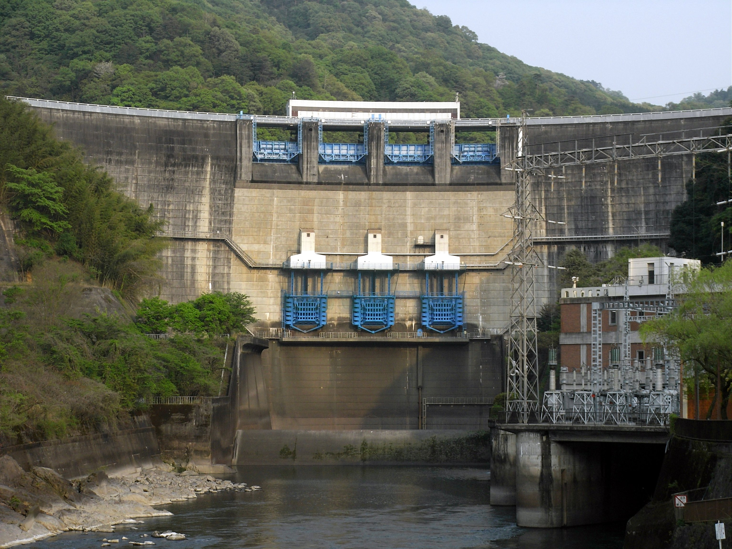 Dam